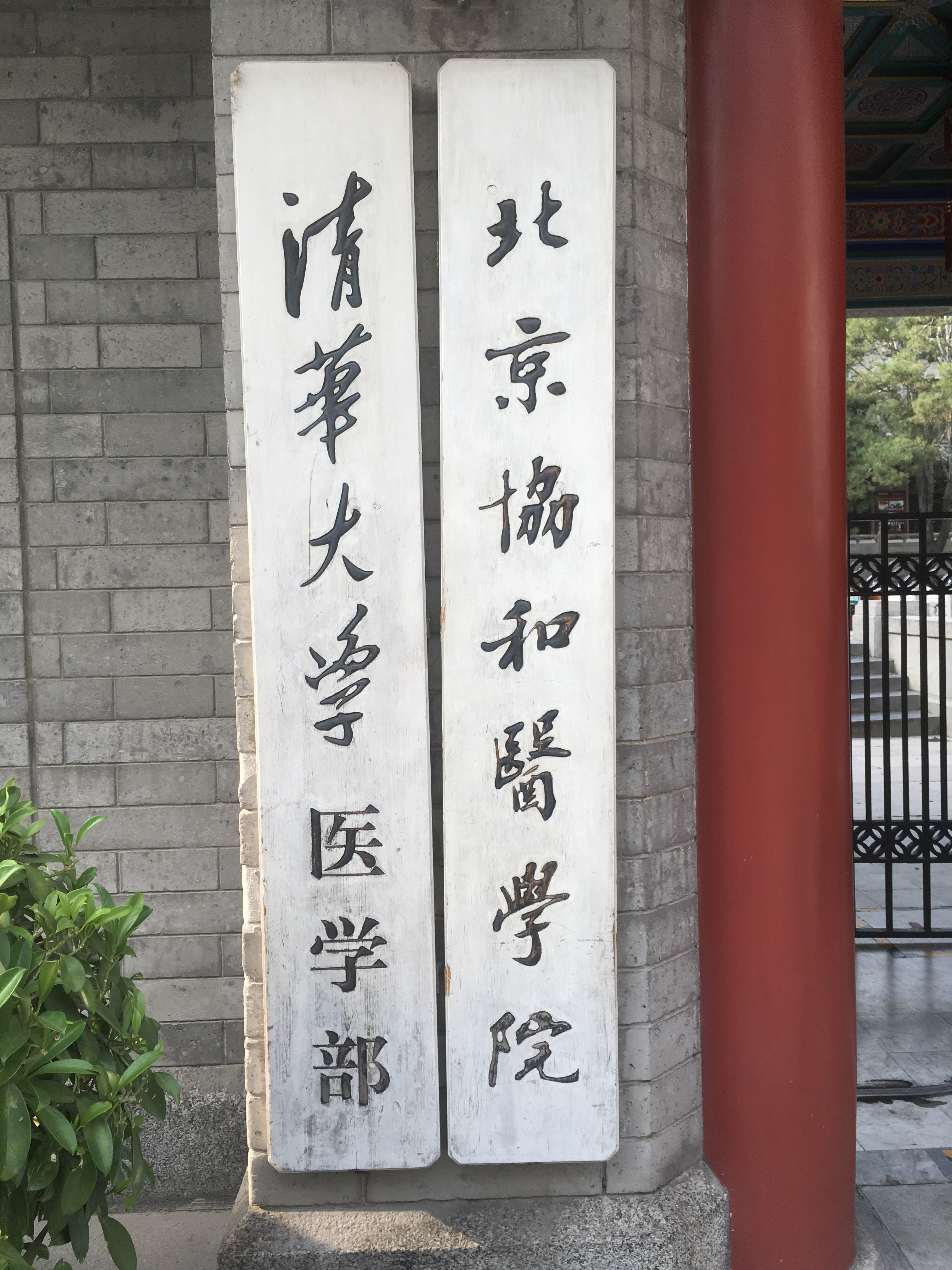 清華協和一個機構兩塊牌子